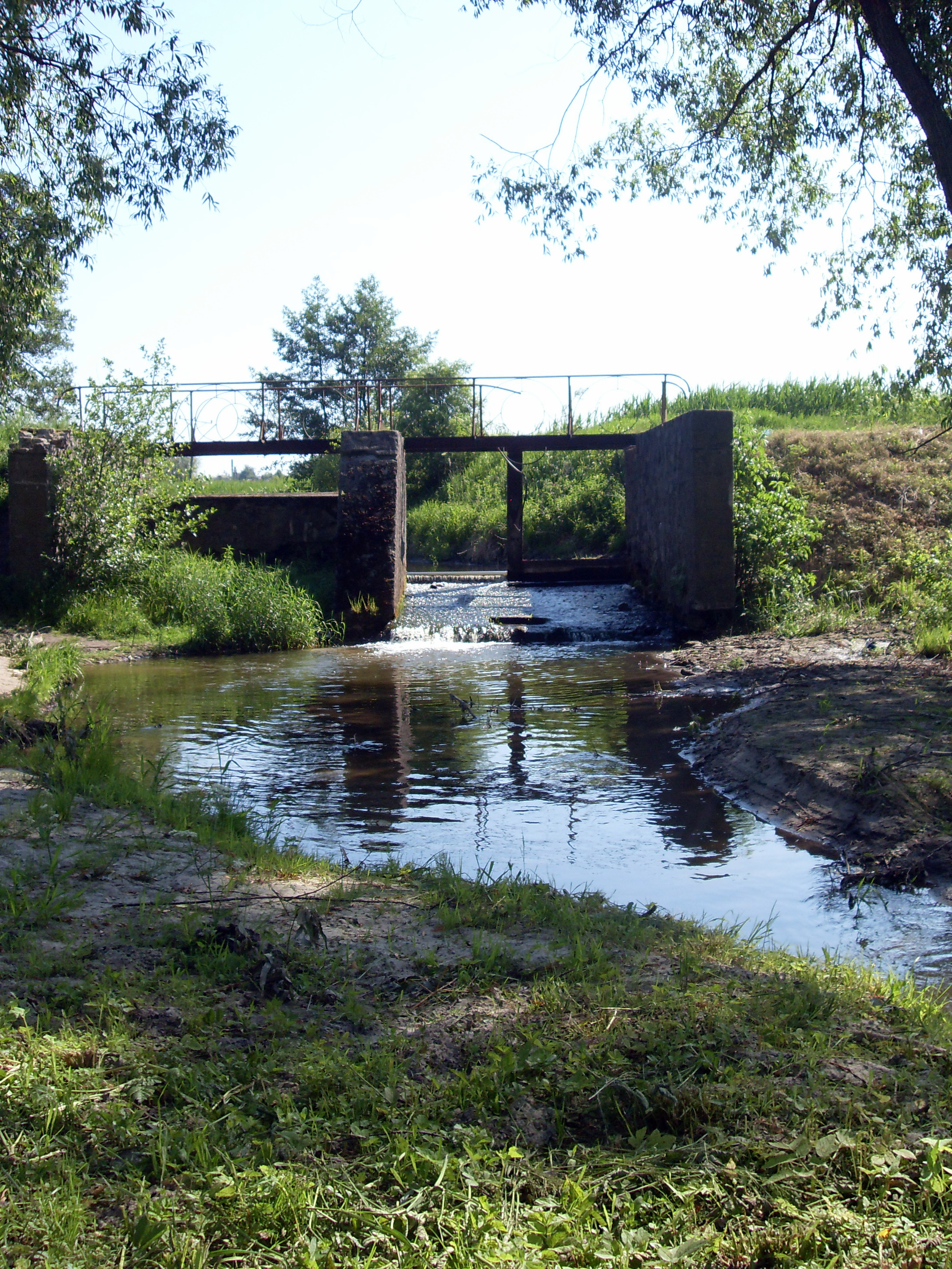 Rzeka Białka w Białej Rawskiej